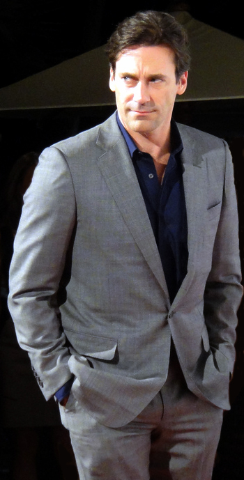 Jon Hamm (2010)